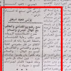 قرار دمج اندية جدة رضوى والهلال البحري والتسامي والطالب في عام 1388هـ